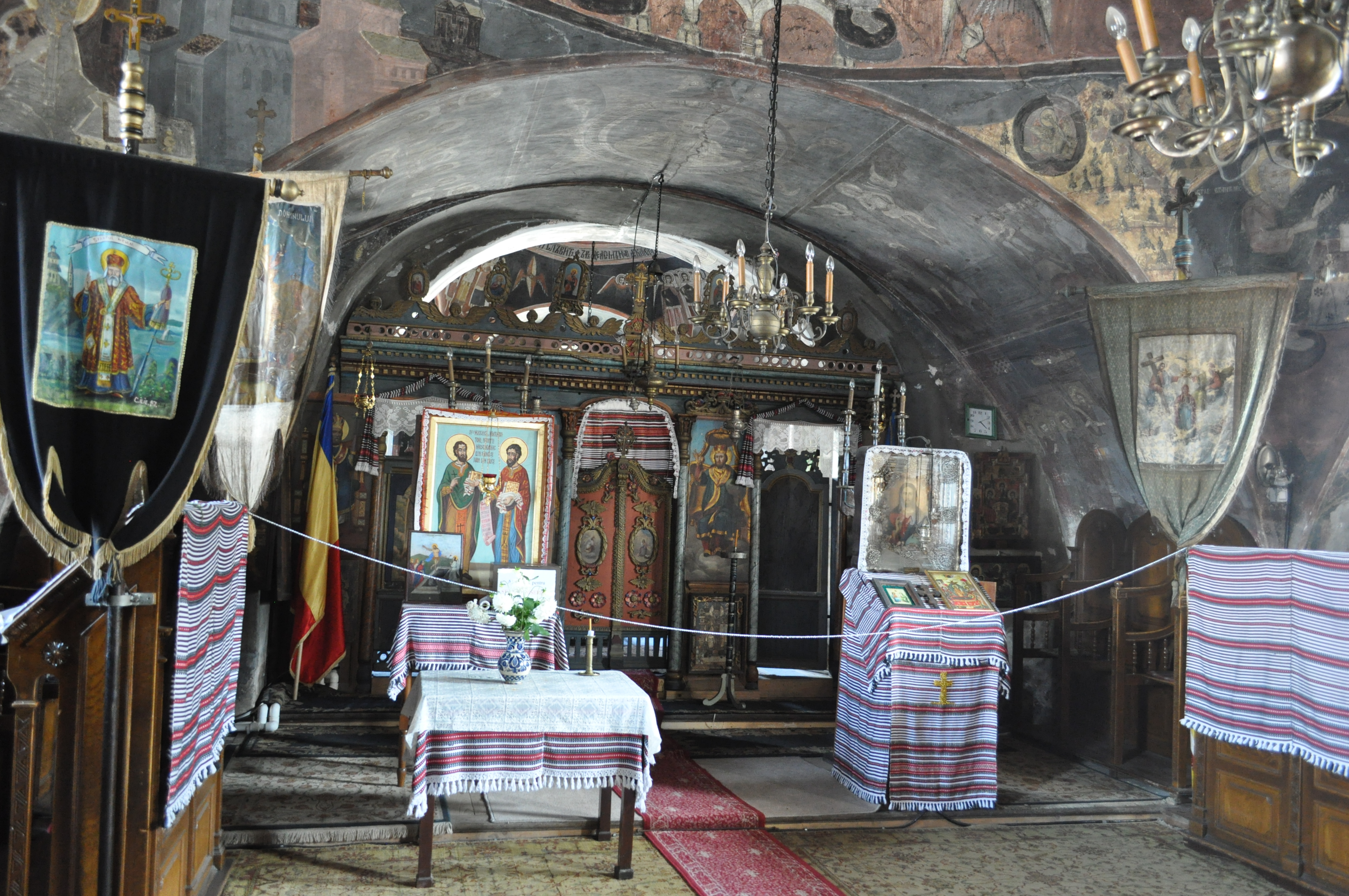 Biserica ortodoxă „Sfânta Treime”